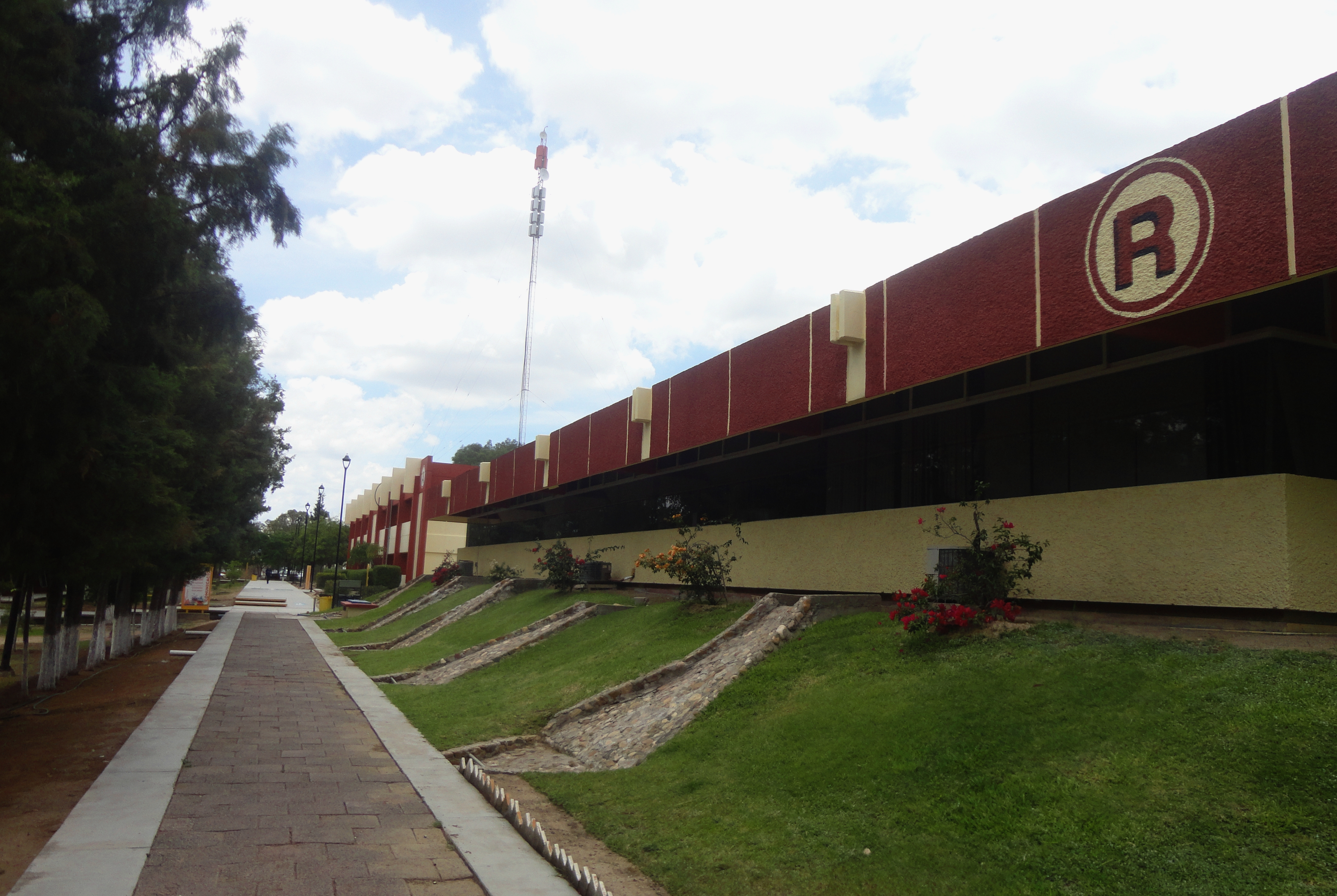 Edificios de la Universidad Tecnológica del Norte de Guanajuato (UTNG), Dolores Hidalgo, Guanajuato, México.